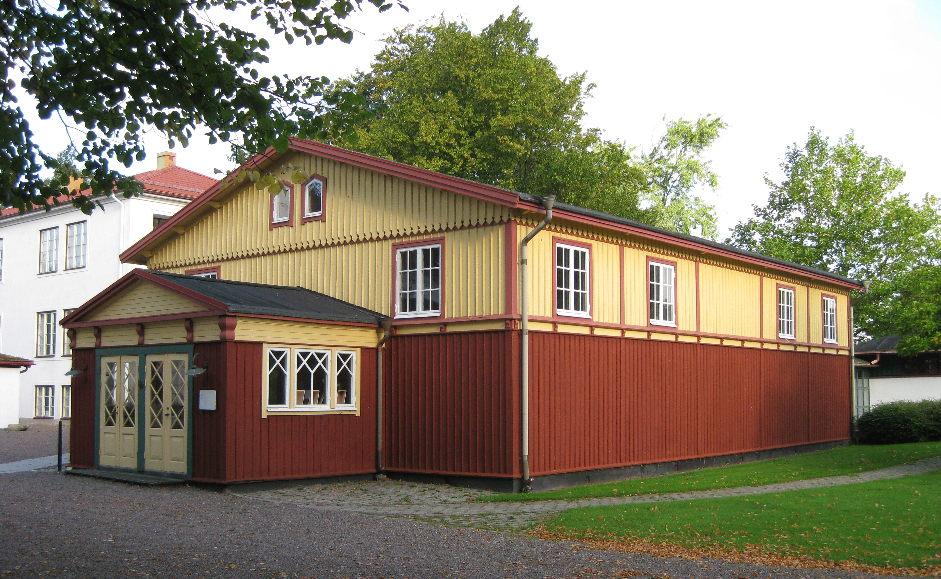 Gymnastiksalen på Hvilans folkhögskola